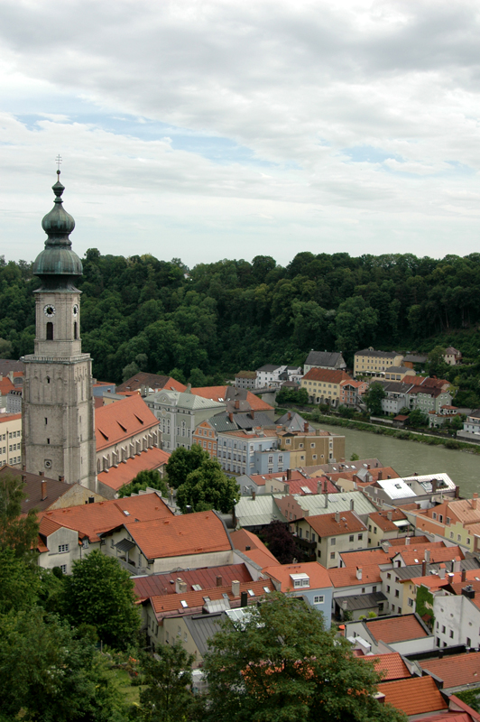 Burg zu Burghausen, Blick auf die Altstadt